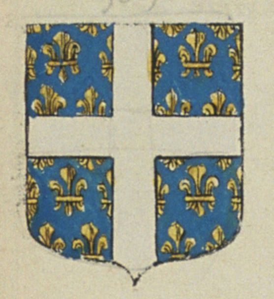 Armoiries des religieux de l'abbaye Saint-Remi de Reims dans l'Armorial général de France, dressé, en vertu de l'édit de 1696, par Charles-René d'Hozier, volume 10, Champagne.